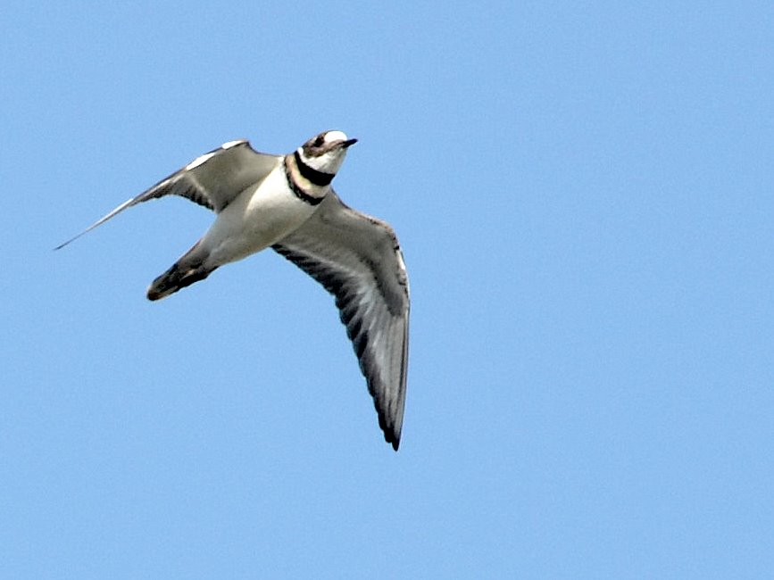 Kildeer